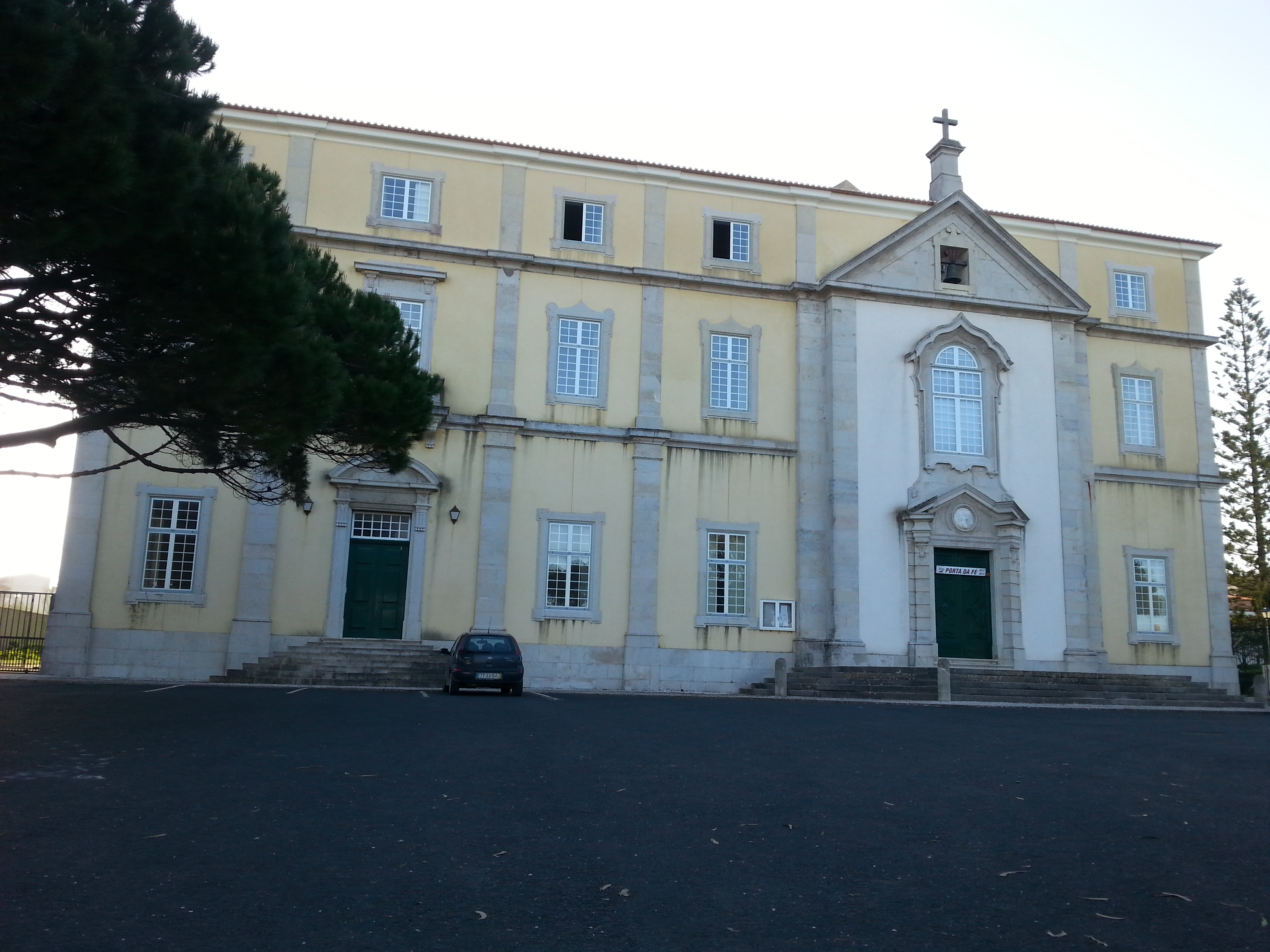 Seminário e Igreja de Penafirme